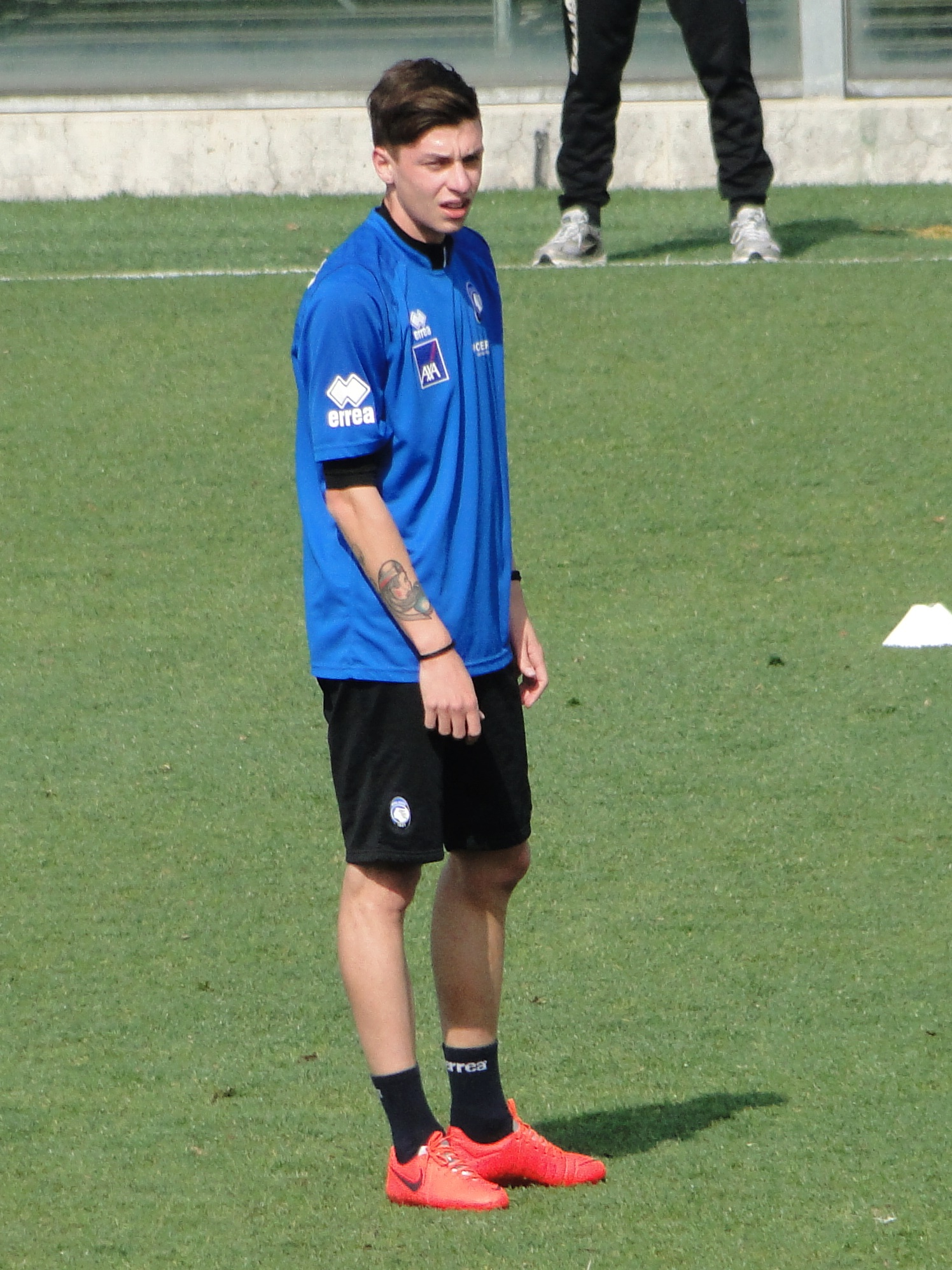 Daniele Baselli, calciatore italiano